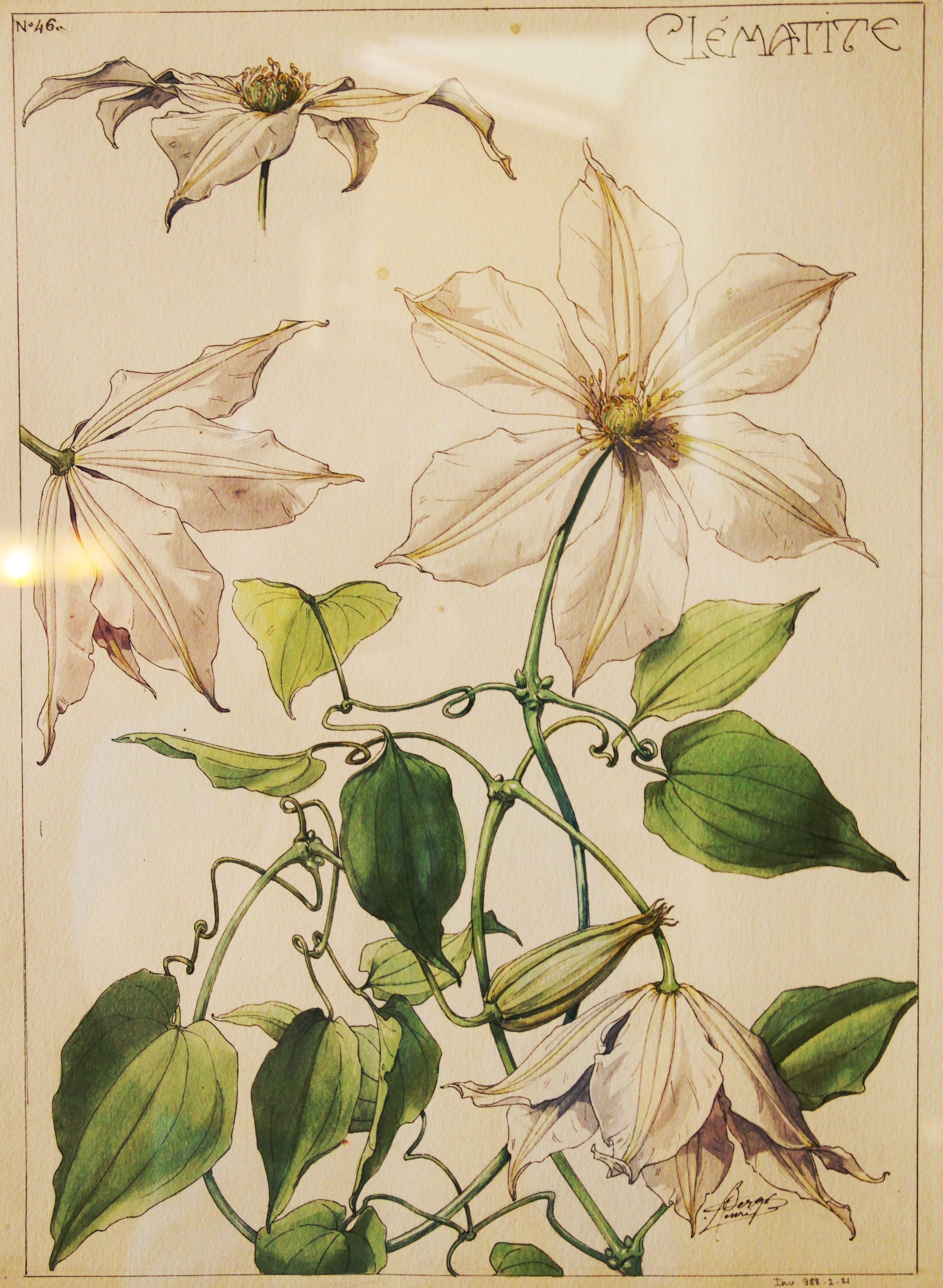 Henri Bergé Etude de clématite, 46 Signature à droite : Bergé / Henri Aquarelle et encre de Chine sur papier Don, 1988 (inv. 988.2.21)